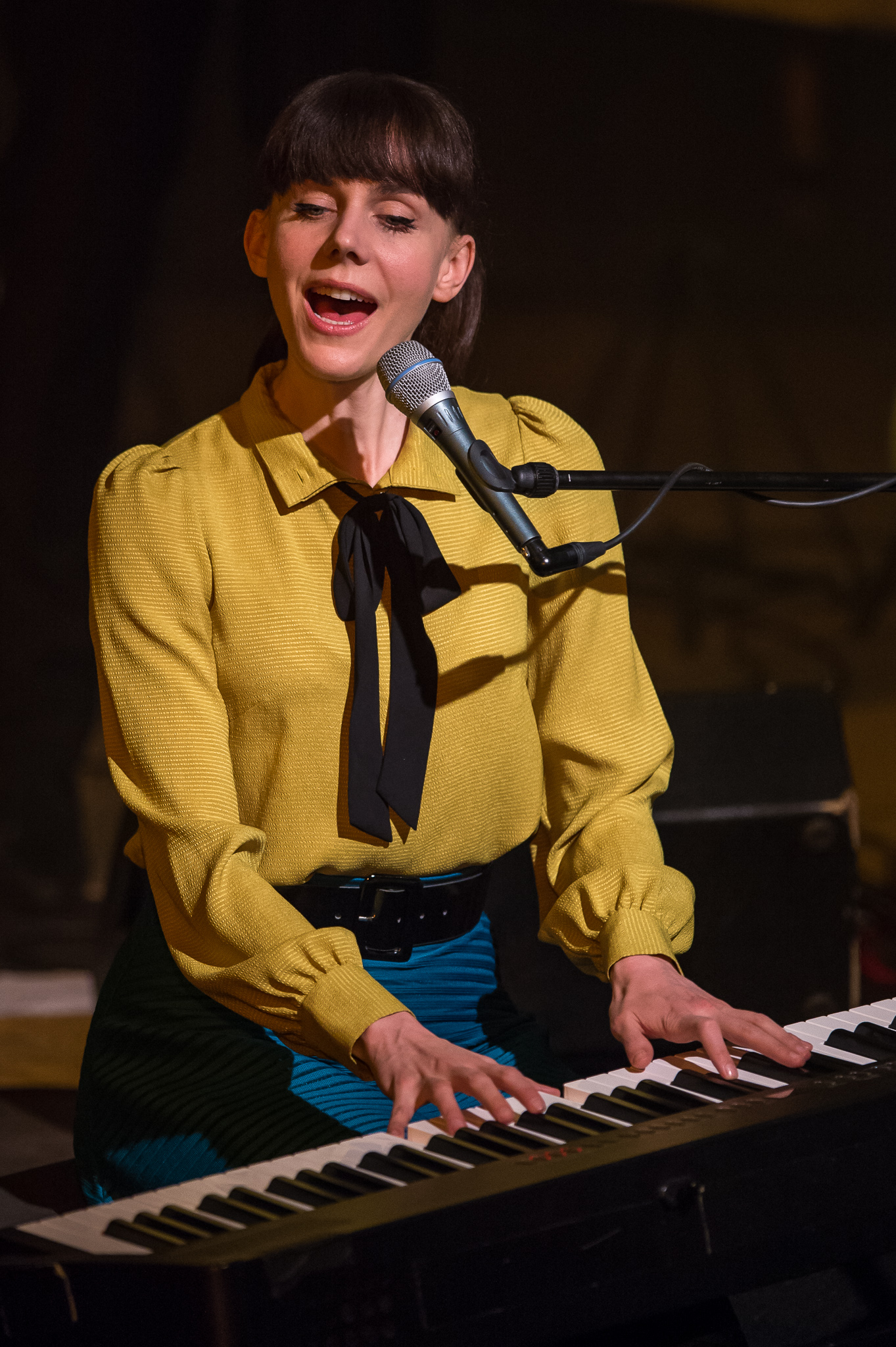 Anna Depenbusch,Concertbüro Franken,Konzert,LUX – Junge Kirche Nürnberg,Livekonzert,Livemusik,Musik